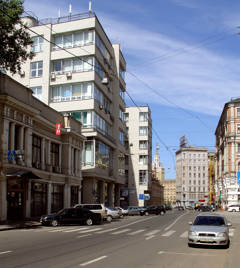 1927 Gostorg Building, Moscow, Myasnitskaya Street, 47 RUSSIAN: Здание госторга, ныне Министерство торговли РСФСР, 1927 г., арх. Барщ М.О., Великовский Б.М., Владимиров В.Н., Вегман Г.Г. Москва, Мясницкая, 47